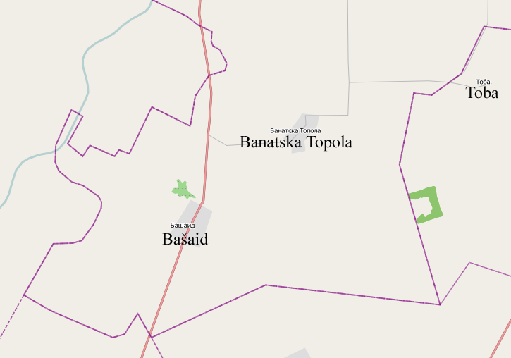 Mapa Banatske Topole i okolnih naselja.